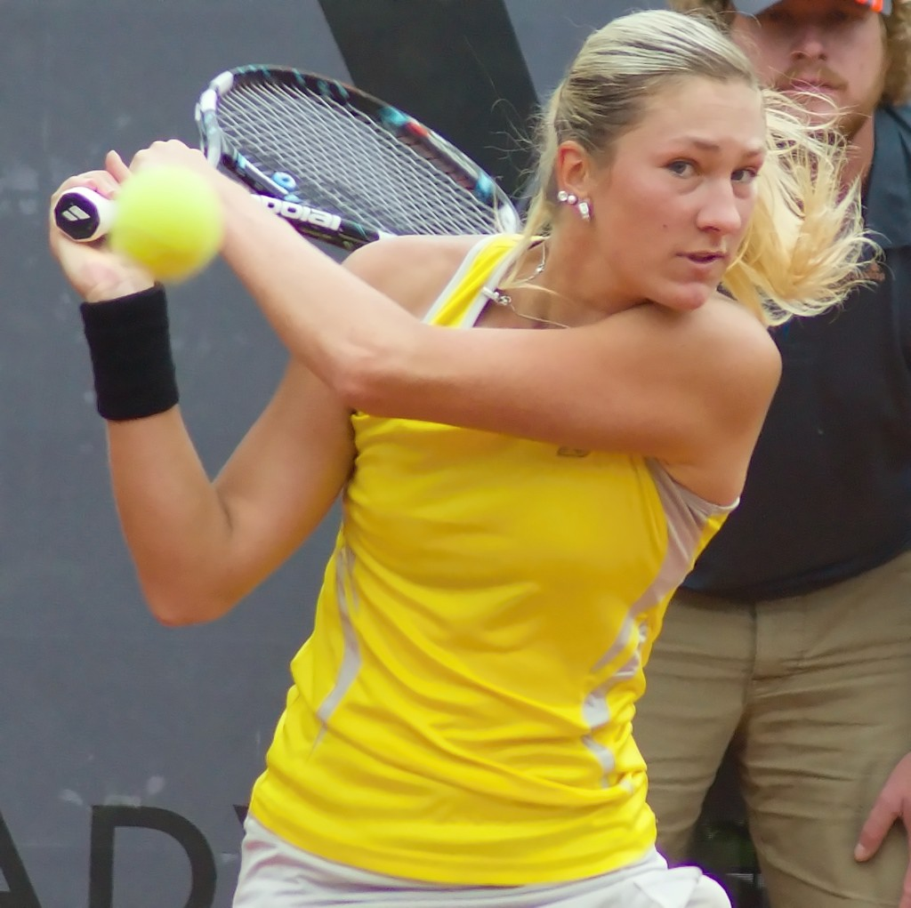 Denisa Allertová, ITF 25.000 Plzen